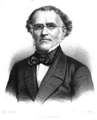 Carl Wilhelm Boeck (1808–1873)